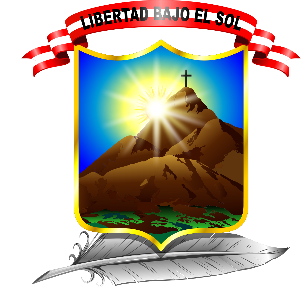 Distrito de Sayán - Provincia de Huaura - Región Lima